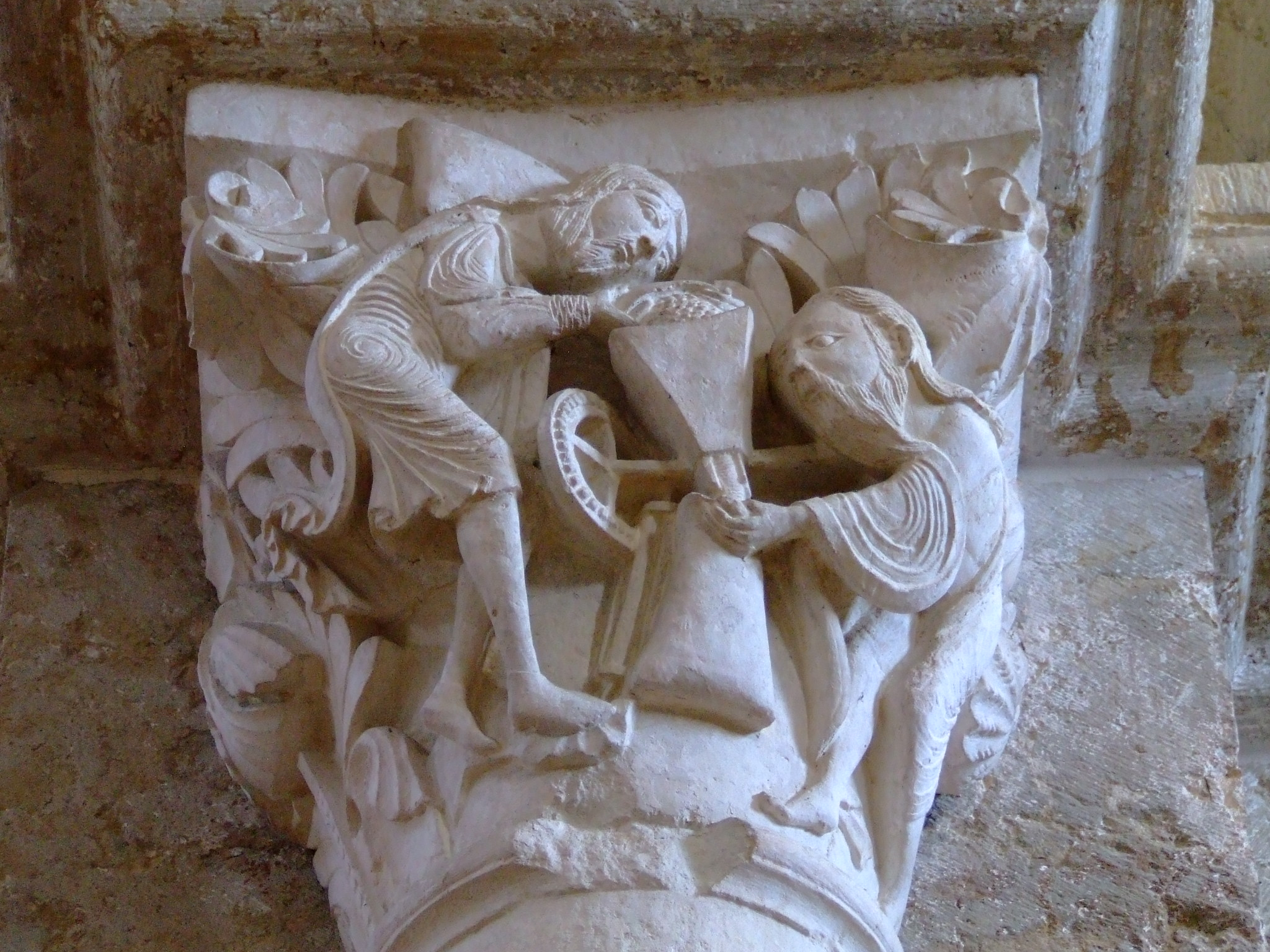 Basilique de Vézelay le chapiteau du moulin mystique.